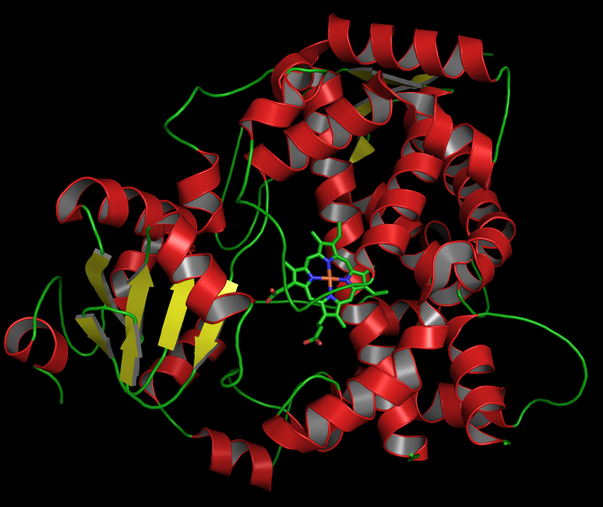 Cytochrom P450 3A4, röntgenographisch ermittelte Struktur, Cartoon-Darstellung.